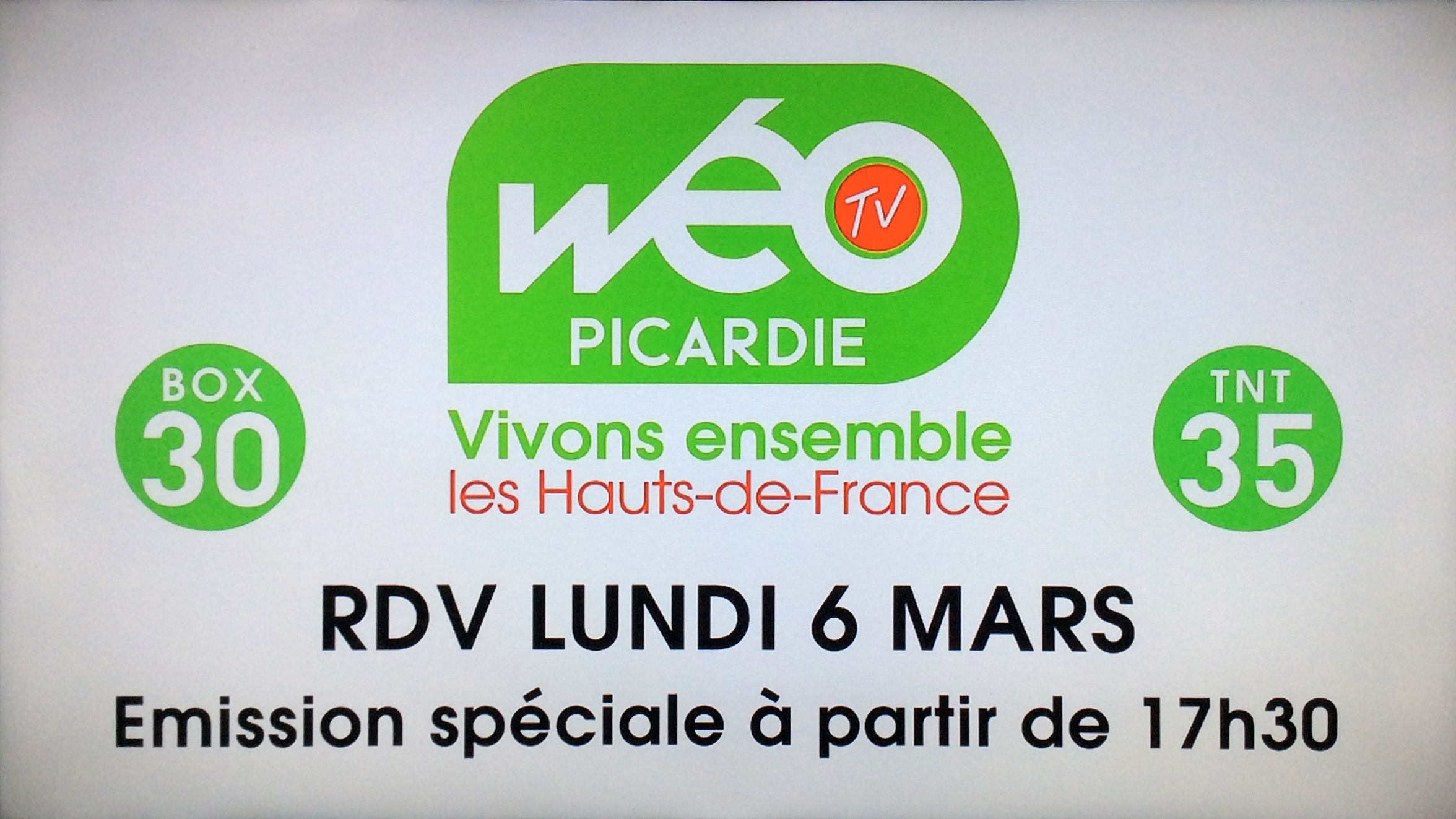 Capture Ecran pré-lancement Wéo sur le canal 35 de la TNT à Amiens